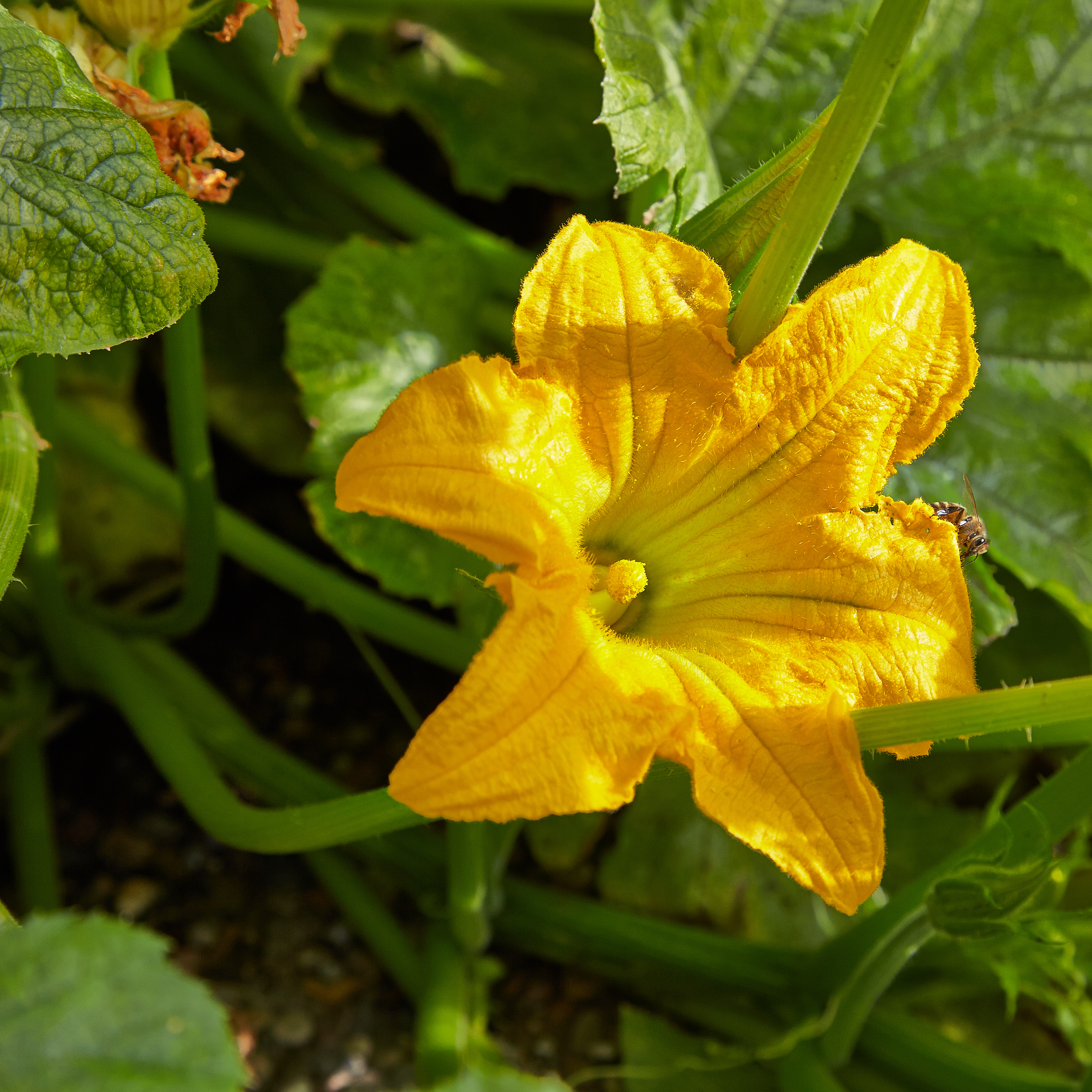 Cucurbita pepo identifierad med hjälp av skylt i Bergianska trädgården.